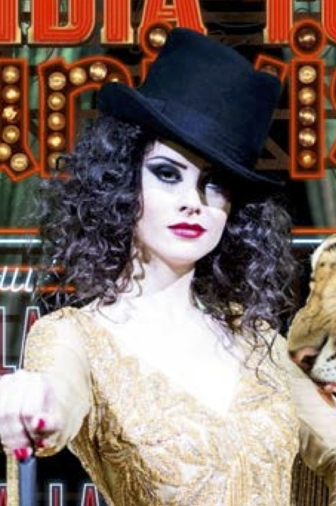 Couverture du numéro 116 du magazine tunisien Tunivisions.